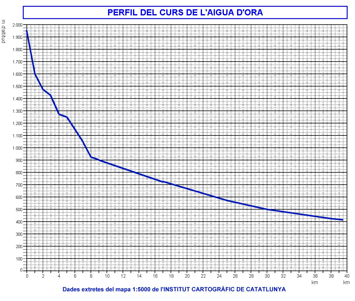 Gràfic del perfil del curs del riu Aigua d'Ora